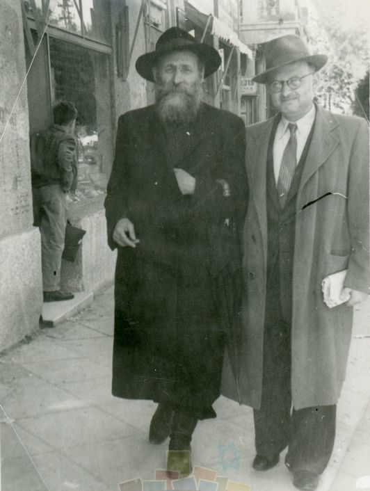 משה פראגר עם הרב פנחס הכהן לוין מירושלים. הרב פנחס הכהן לוין היה יושב ראש אגודת ישראל.